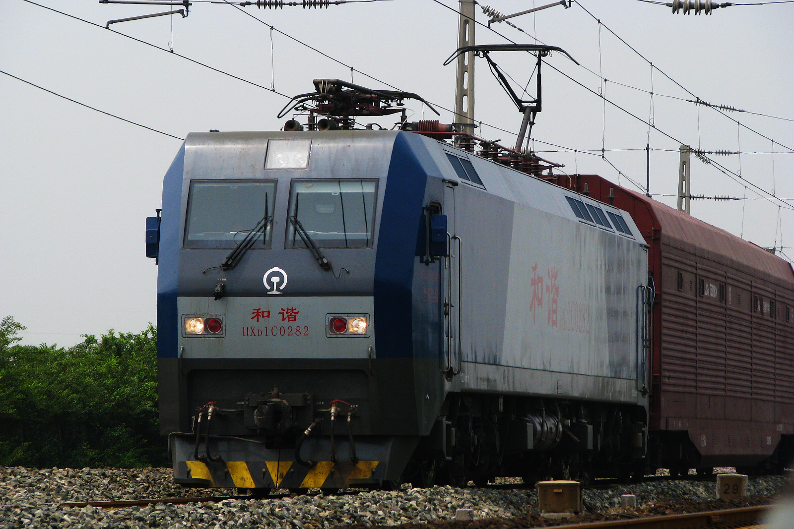 HXD1C型0282号电力机车牵引行包货物列车